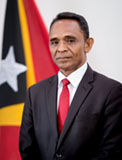 José Agostinho Sequeira, Abgeordneter des Nationalparlaments Osttimors